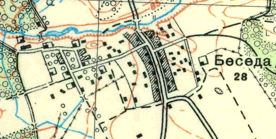 Топографическая карта Ленинградской области, квадрат О-35-22-Г-г (Торма), деревня Беседа.